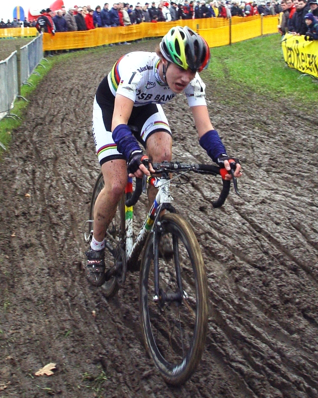 D'Marianne Vos um Cyclo-Cross zu Hoogerheide den 21. Januar 2007.